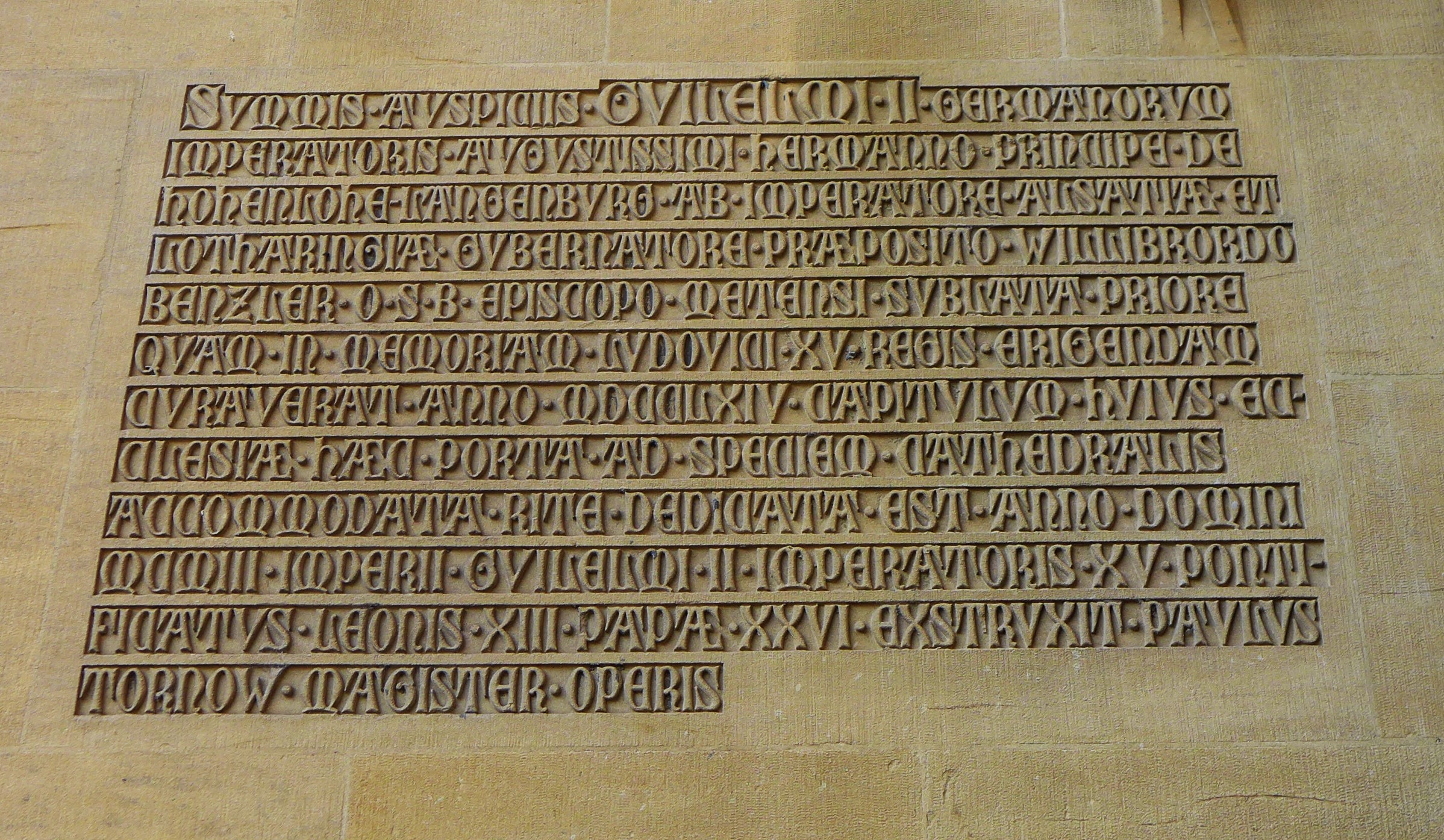 Metzer Dom, Weiheinschrift am Hauptportal